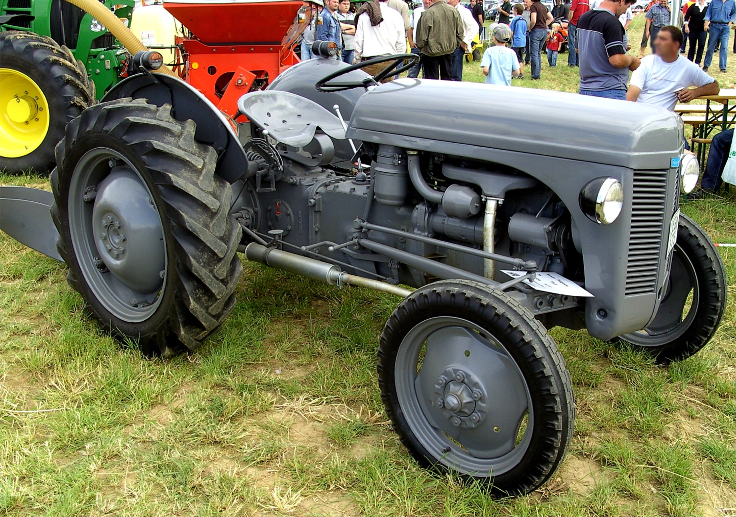 Ein Ferguson TE-F aus dem Jahr 1954.